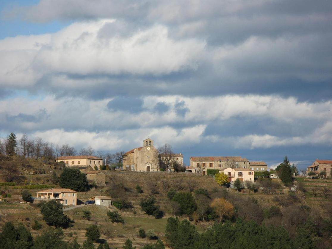 Village de Planzolles (Ardèche)